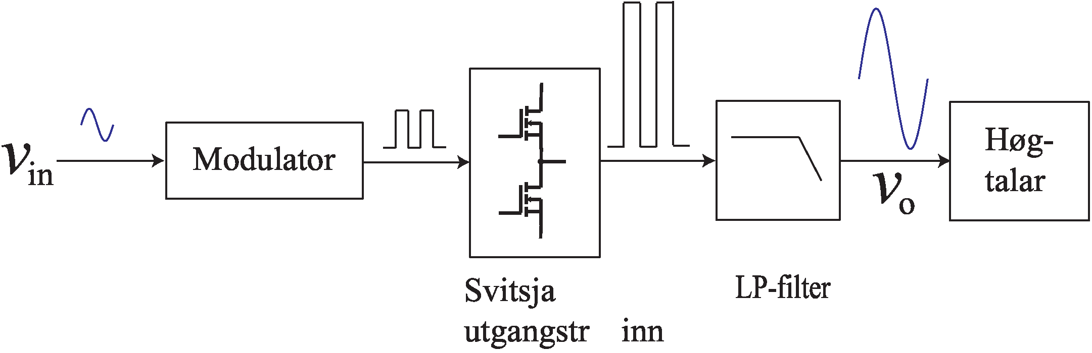 Amplificateur classed-D